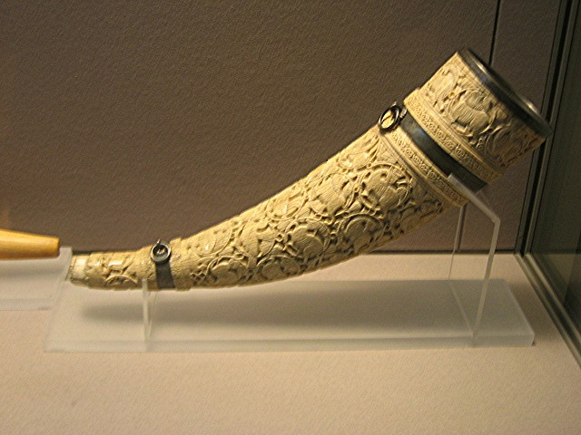 Olifant, Italie, XIe siècle/ Musée du Louvre/ Photo personnelle prise par Urban/ GFDL/ décembre2004